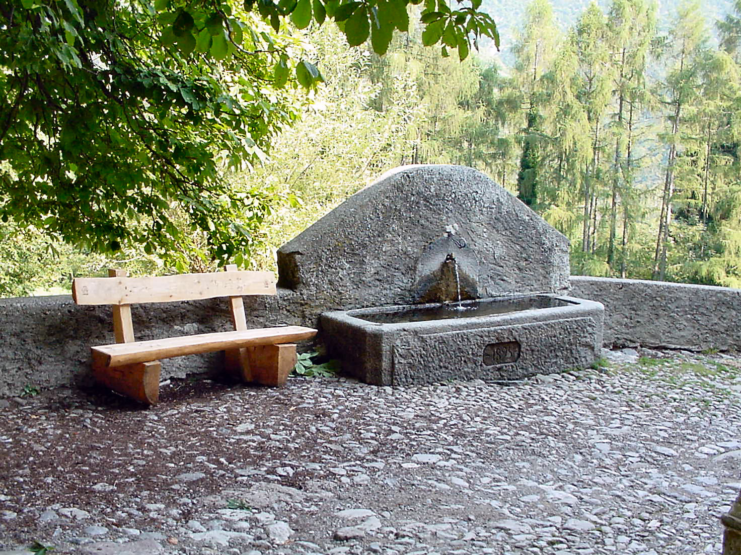 Fonte d' acqua a Prim'Alpe -Canzo (CO)